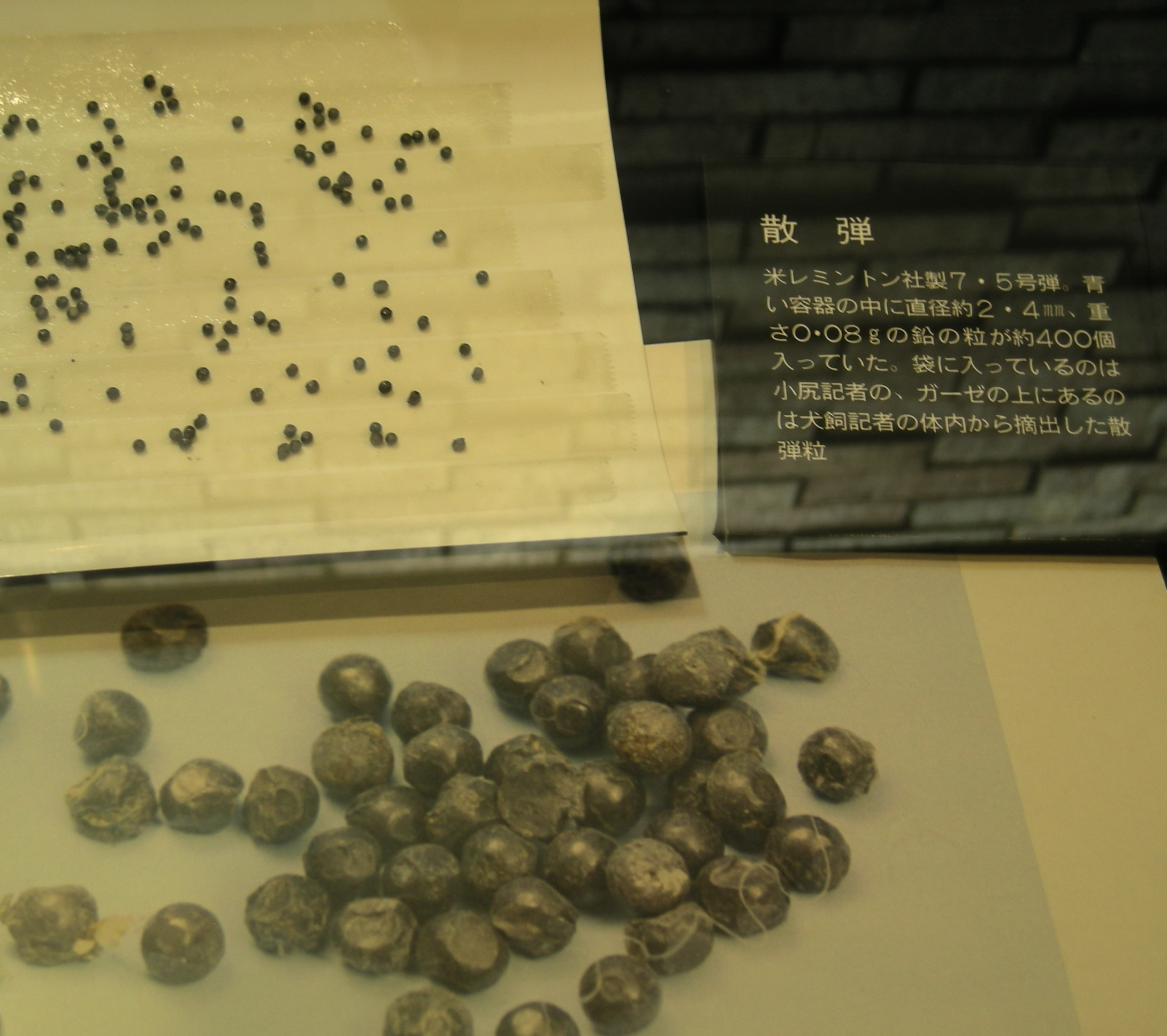 朝日新聞襲撃事件資料室